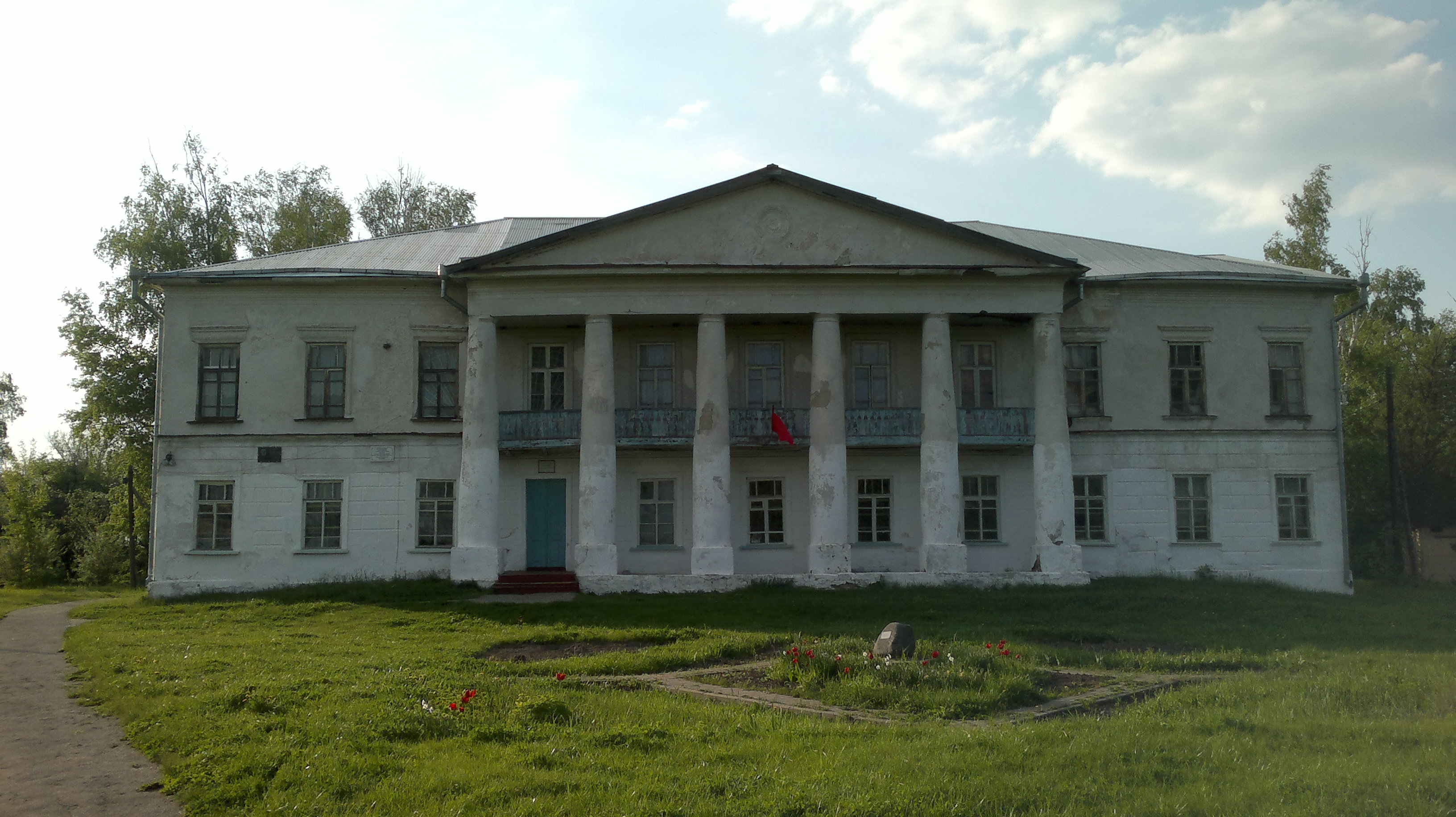 Усадьба Луниных: Лунино, Шиловский район, Рязанская область. Бывшая усадьба, сейчас здесь школа.